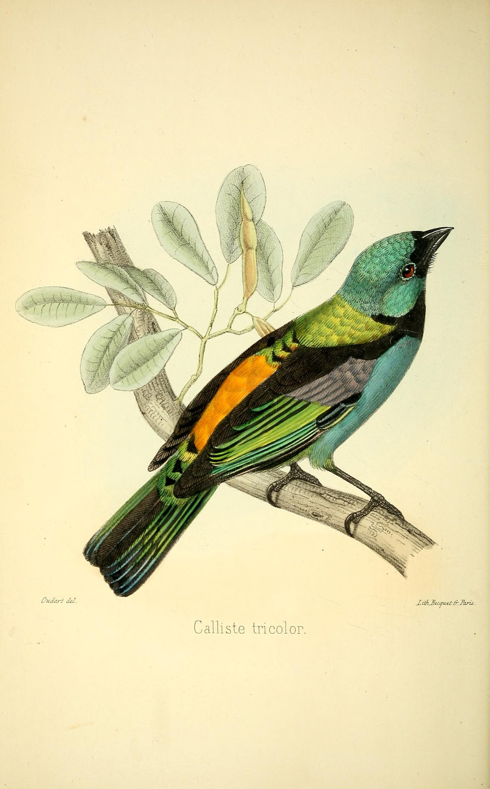 / -4 '1 Oudarir del. XitkStcau4t^.IkrU . Calliste tricolor.